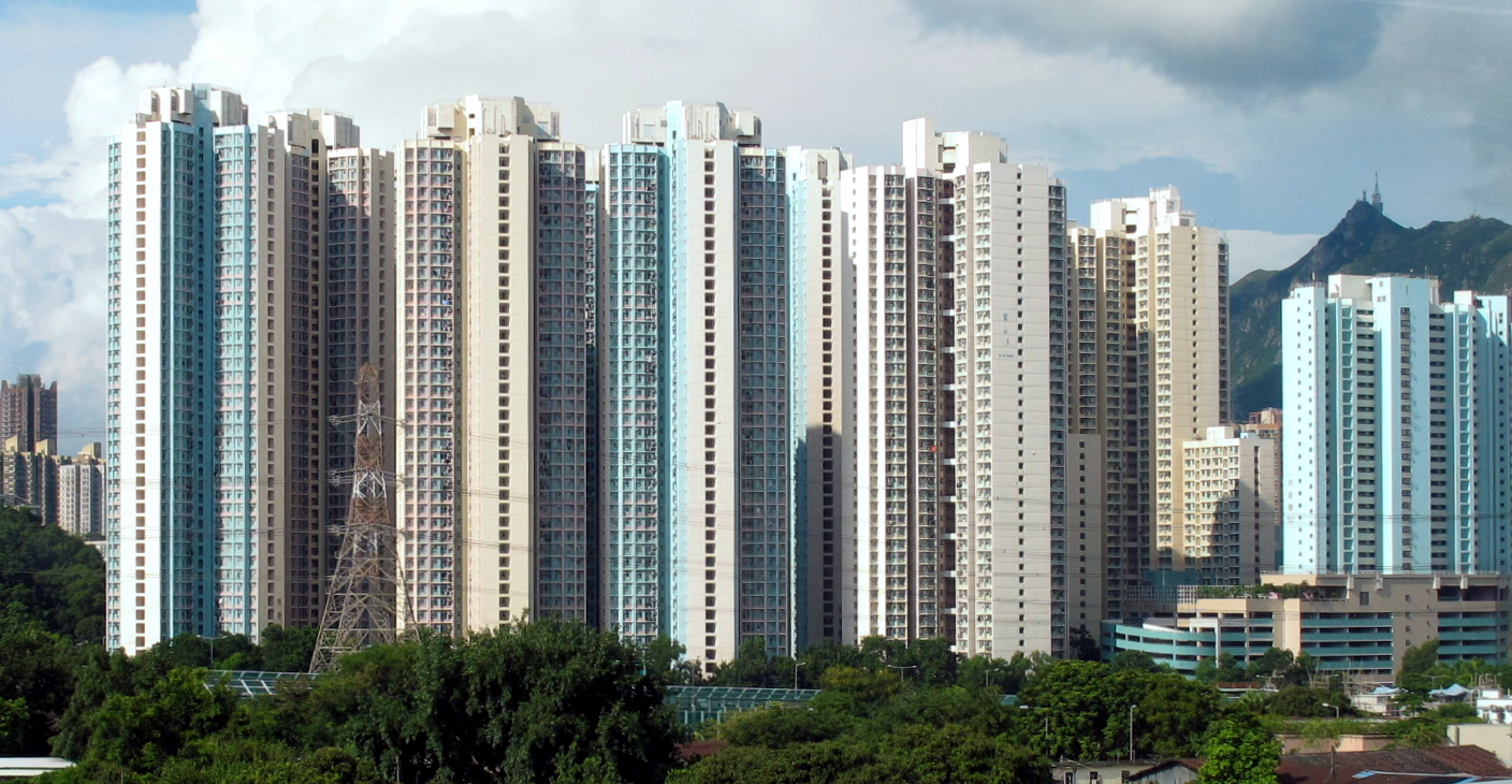 Fu Tai Estate